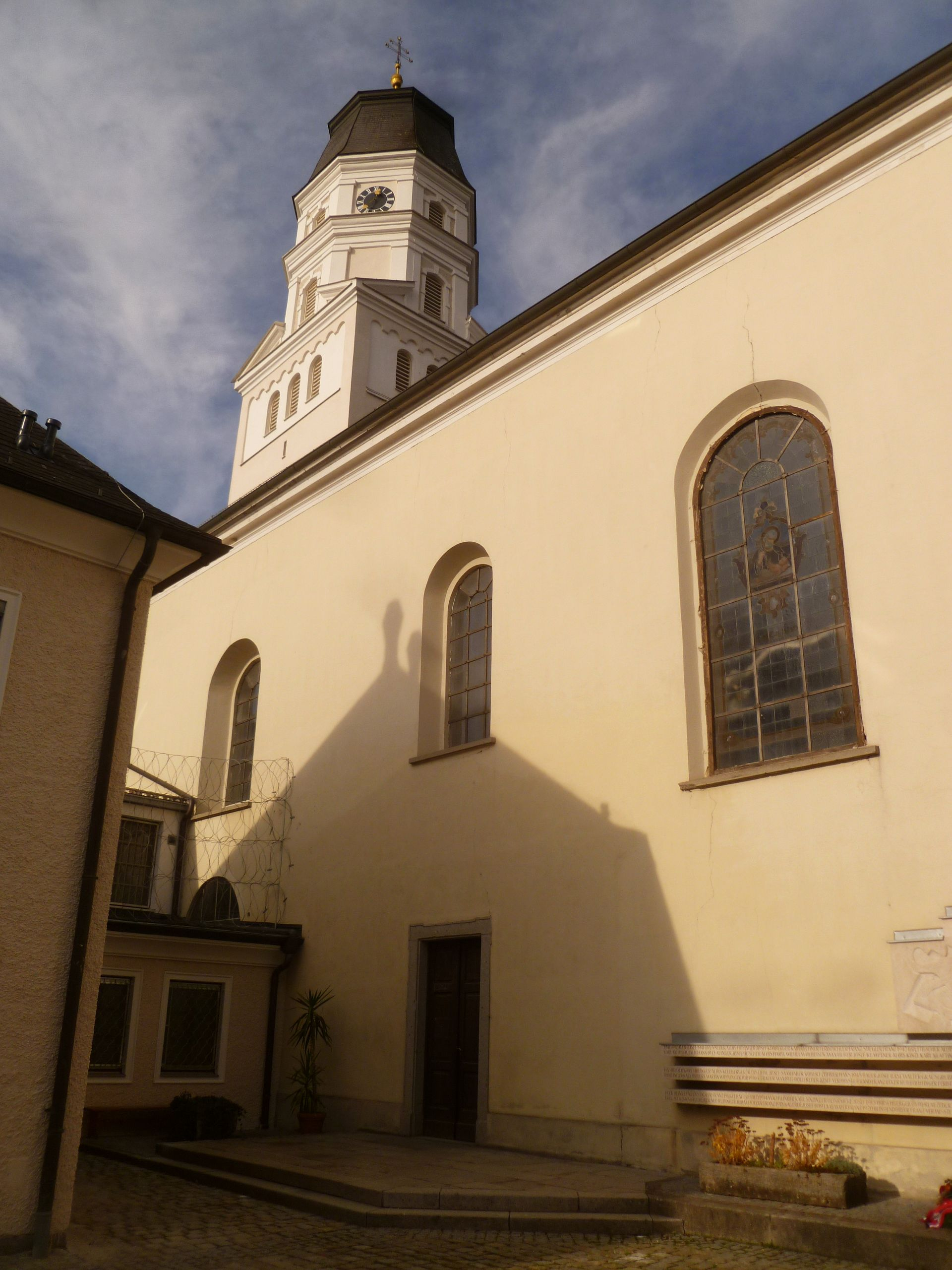 Kath. Pfarrkirche hl. Lambert, ehem. Augustin